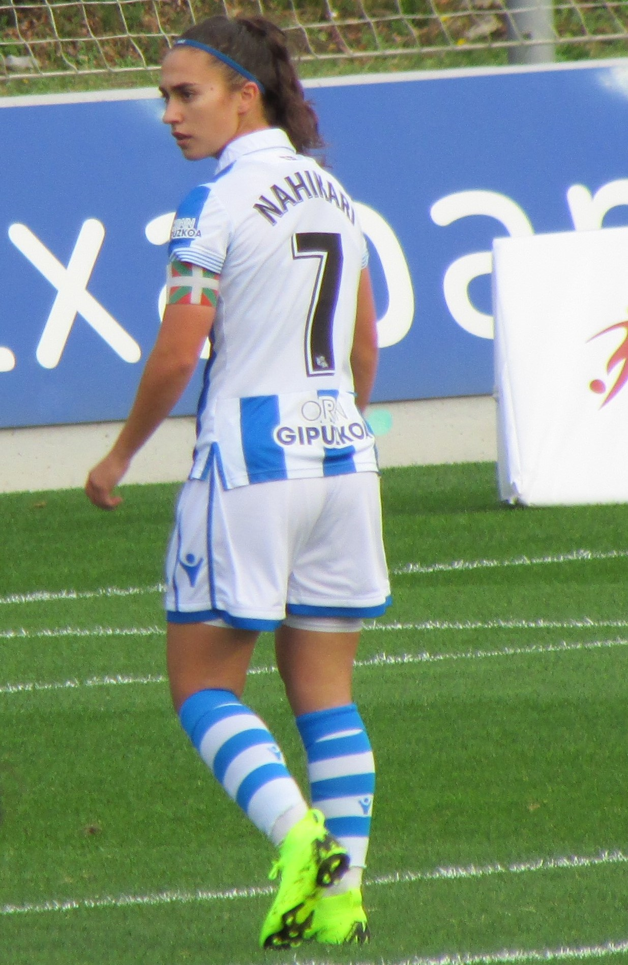 Futbolista de la Real Sociedad